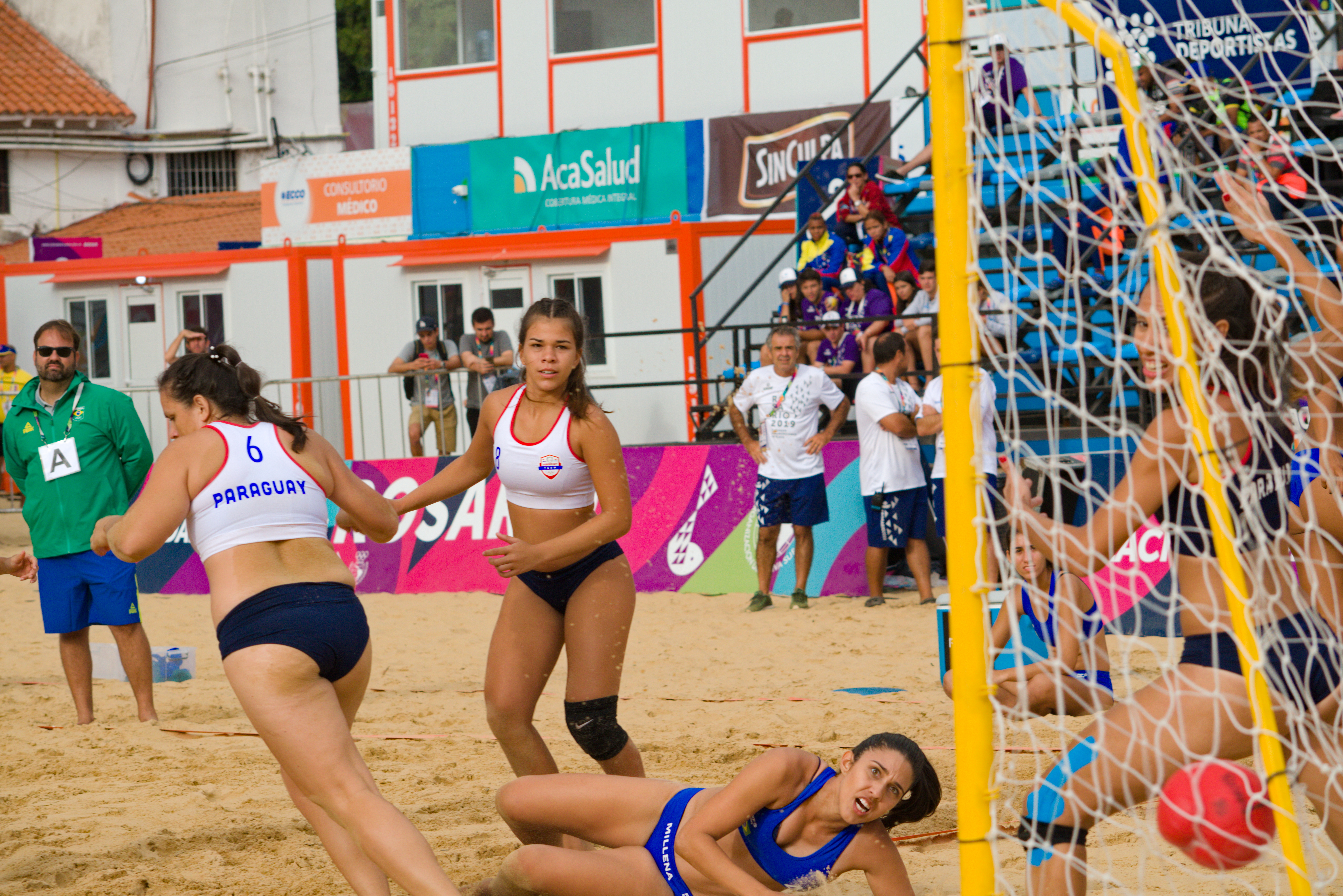 Partido de la semi-final femenina de handball entre Brasil y Paraguay en los Juegos Suramericanos de Playa 2019